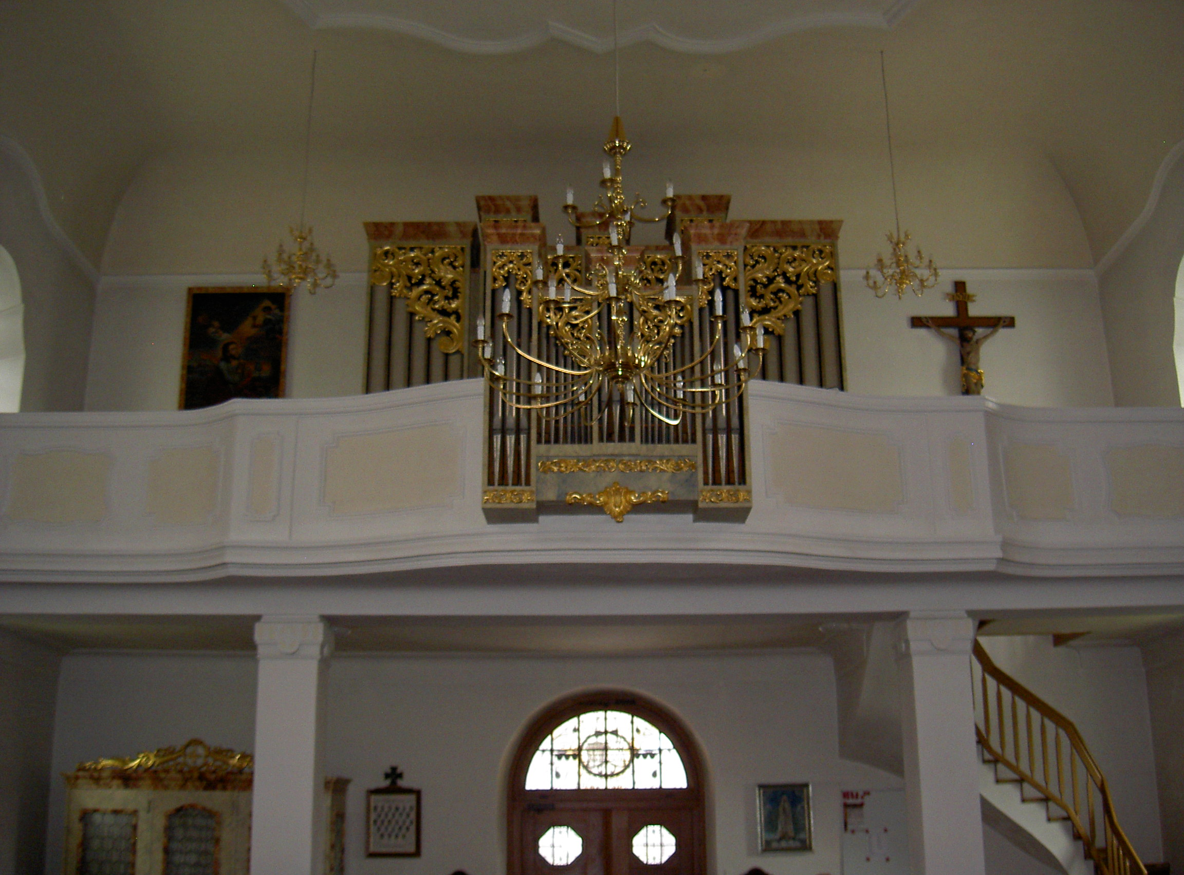 Waldau Kirche Johannes von Nepomuk, Orgel